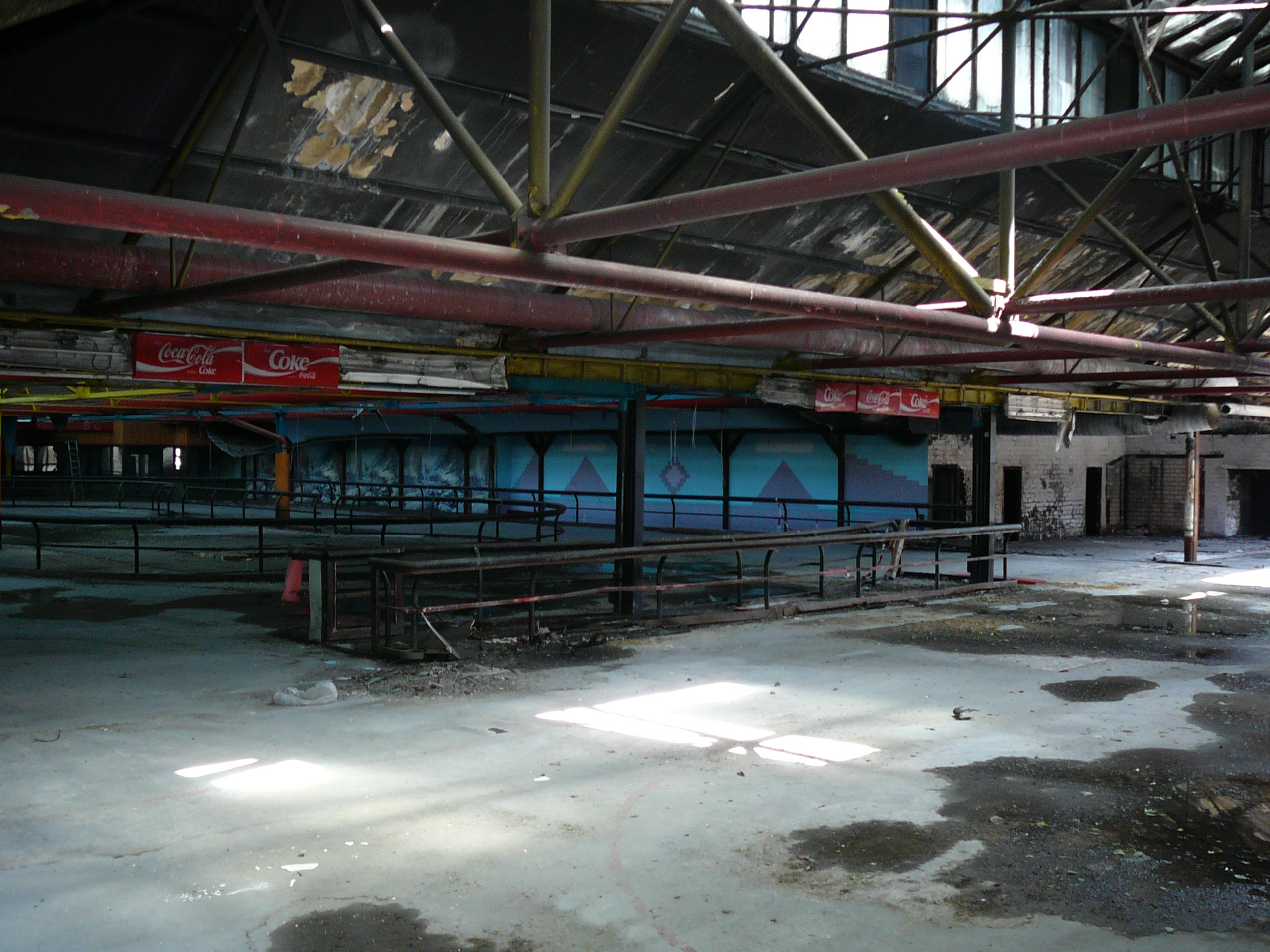 Gebhardgebäude, Kaiserstraße, Wuppertal